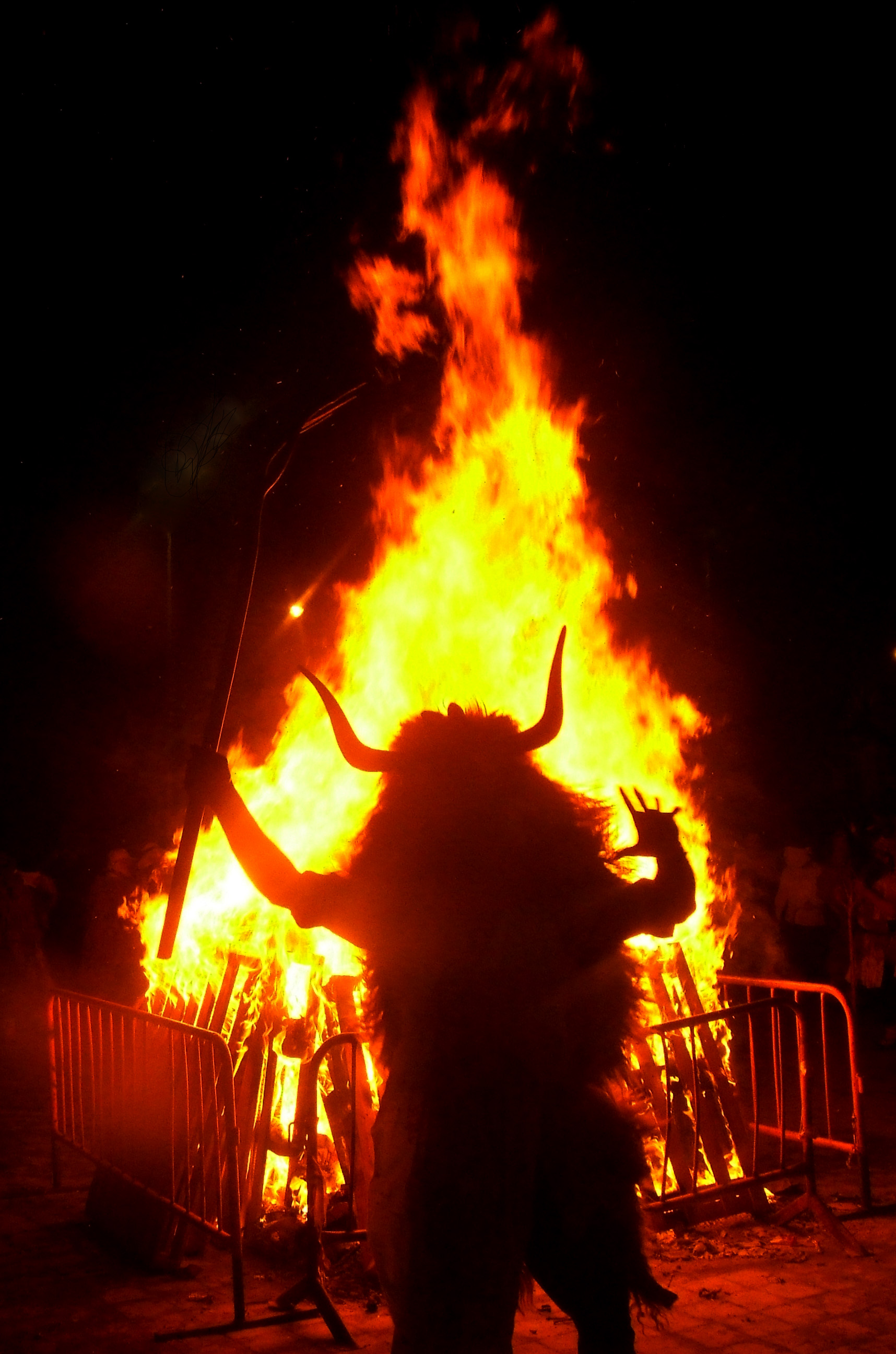 Altsasuko inauteriak - 2009